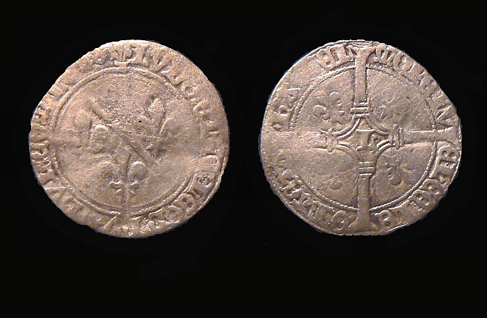 Louis de Bourbon. Billon blanc à l'L, frappé vers 1465 à Hasselt.